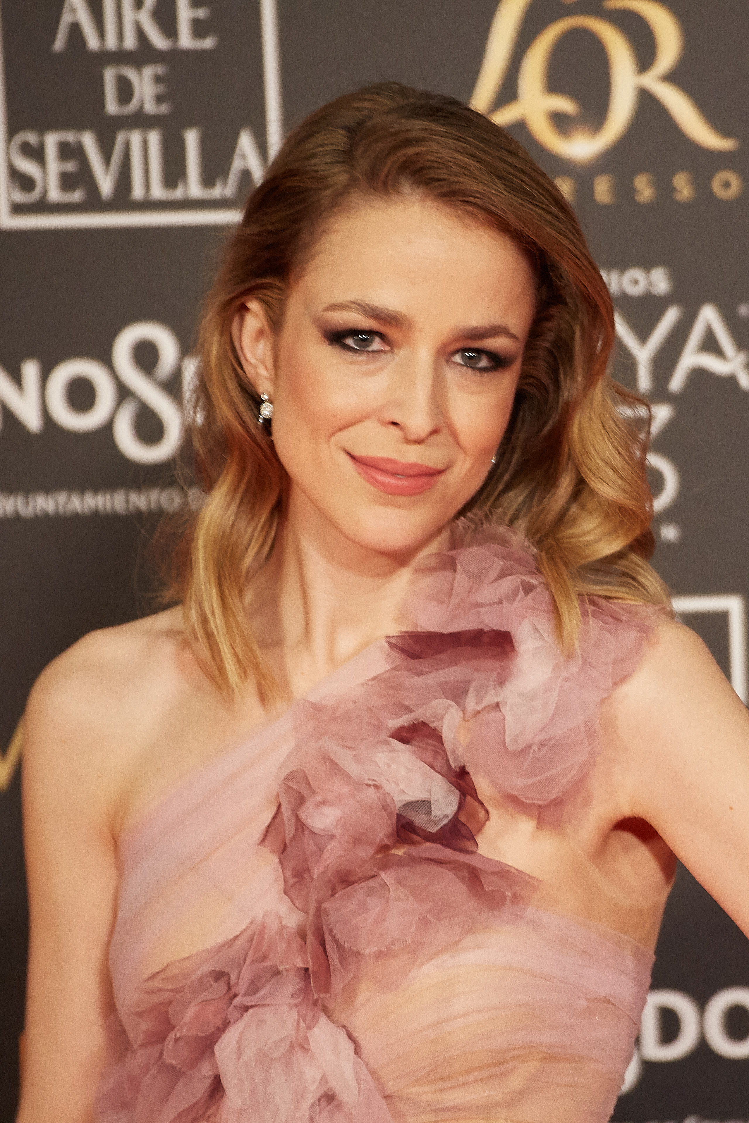 Silvia Abascal en la alfombra roja de los Premios Goya celebrados en Sevilla en Febrero 2019